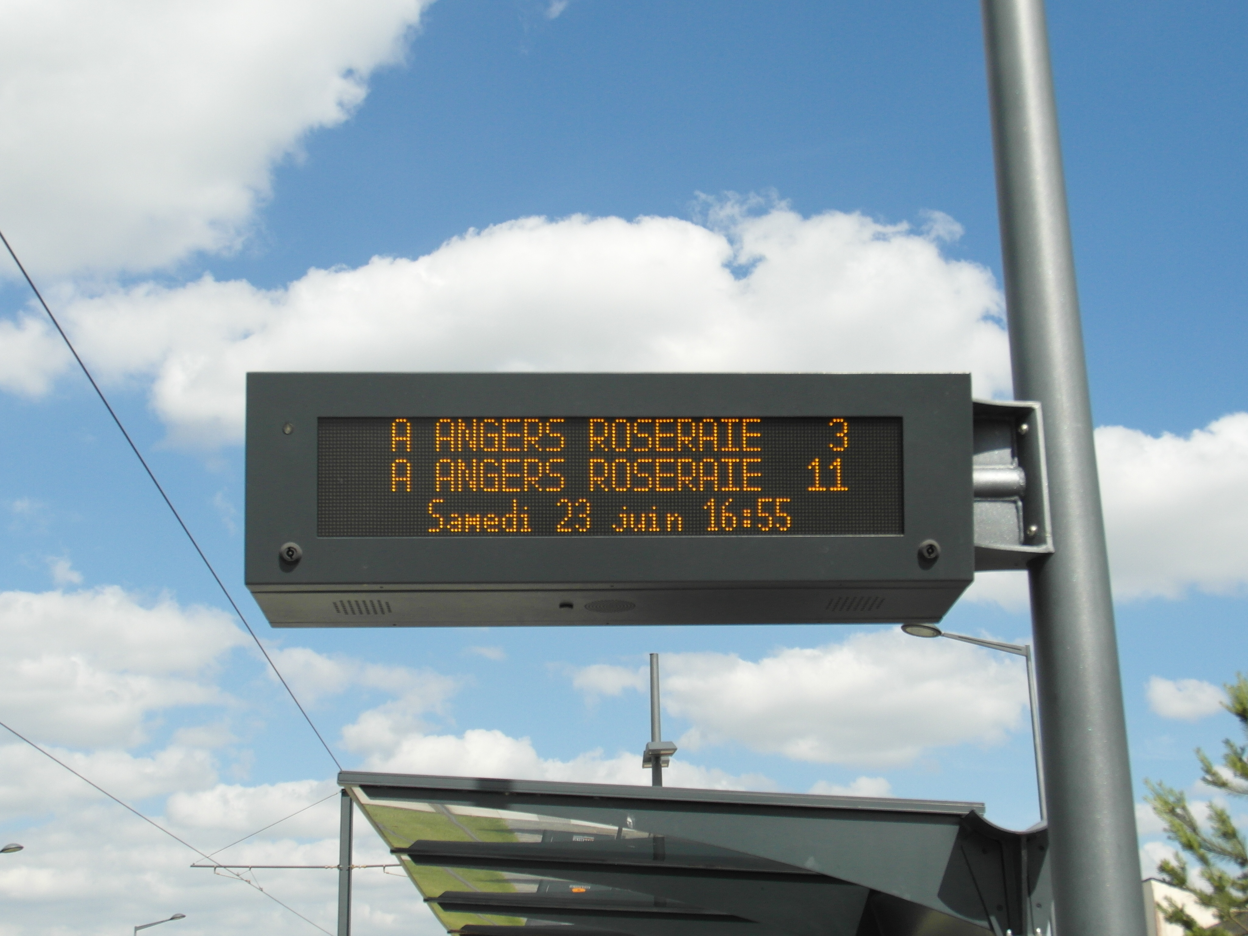 Straßenbahn Angers - Städtebeuliche Integration im Bereich Mayenne / Capucins, einem Entwicklungsgebiet auf ehemaligem Militärflughafengelände